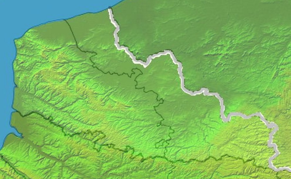 Carte Région Nord-Pas-de-Calais Relief